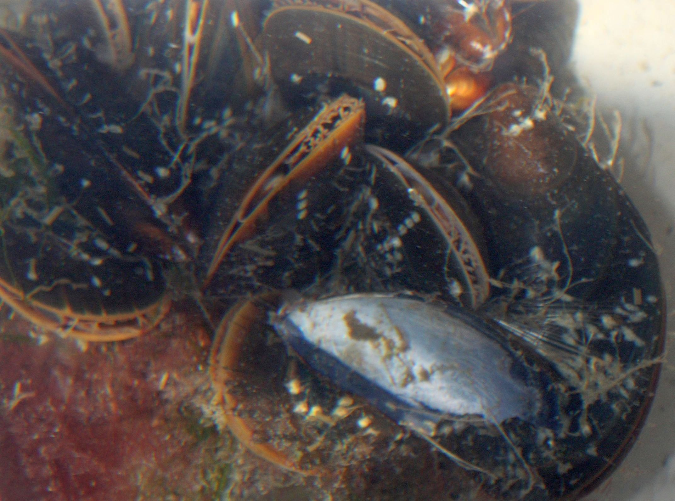 Levende blåskjell Mytilus edulis